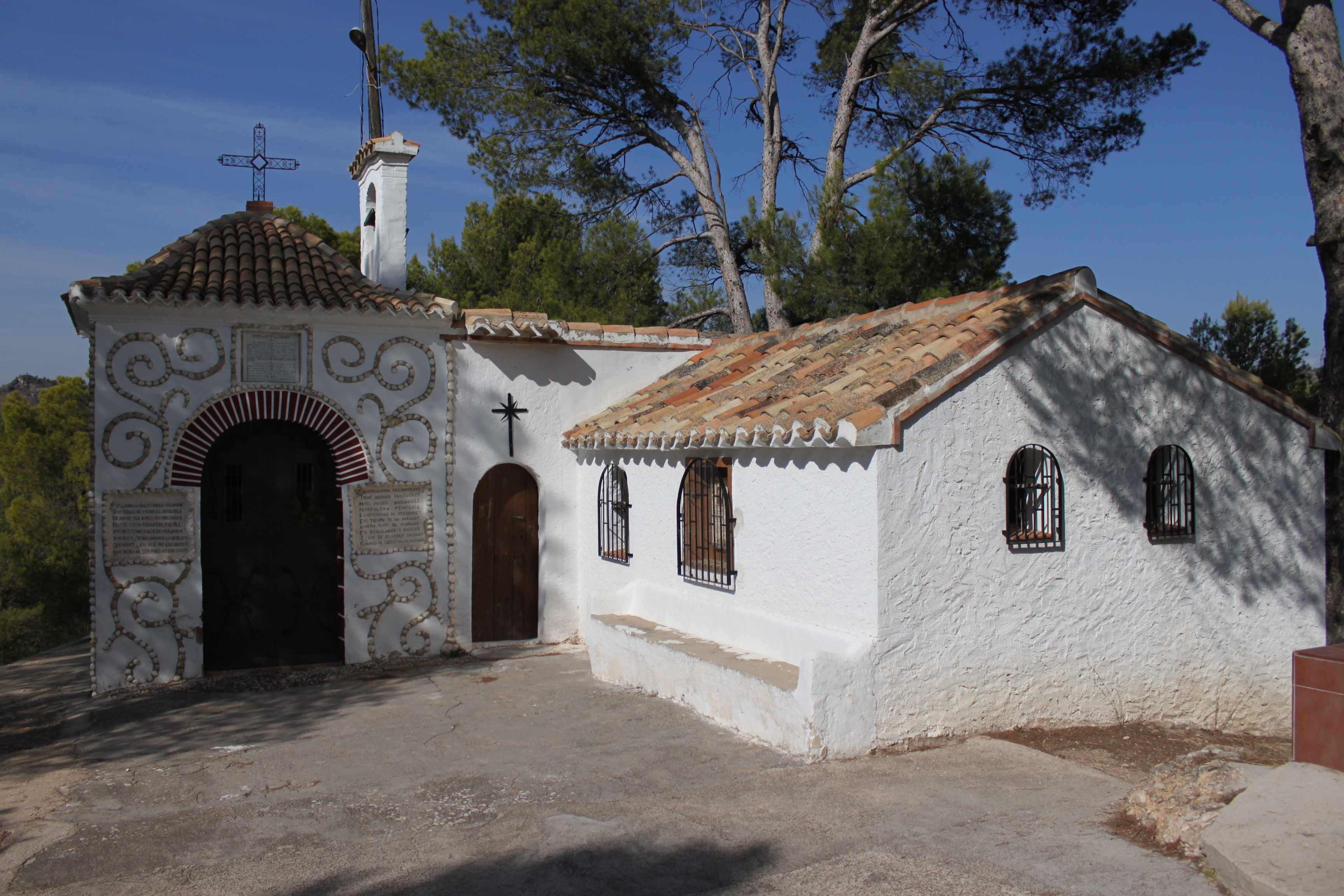 Ermita de la Virgen de la Soledad, Cofrentes, provincia de Valencia, Comunidad valenciana, España